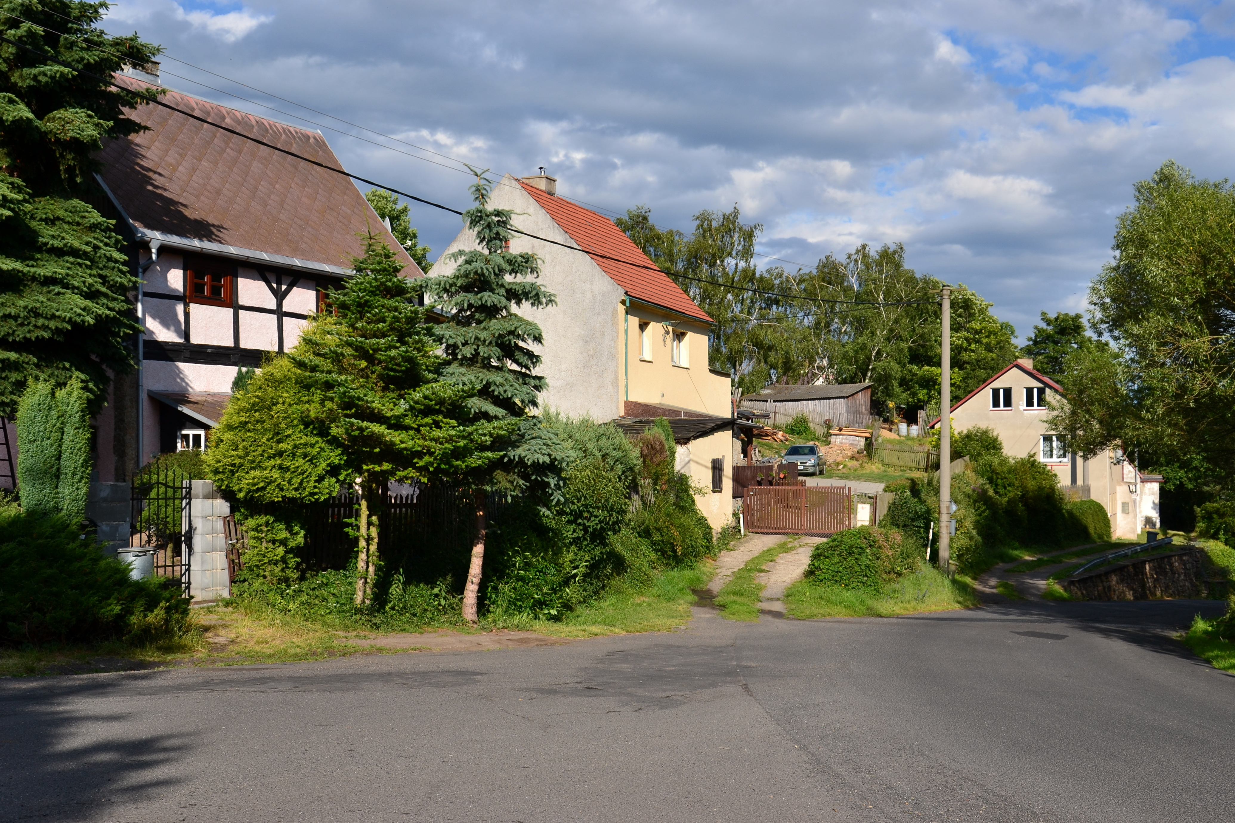 Blahuňov - dolní část vesnice s památkově chráněnou usedlostí čp. 16